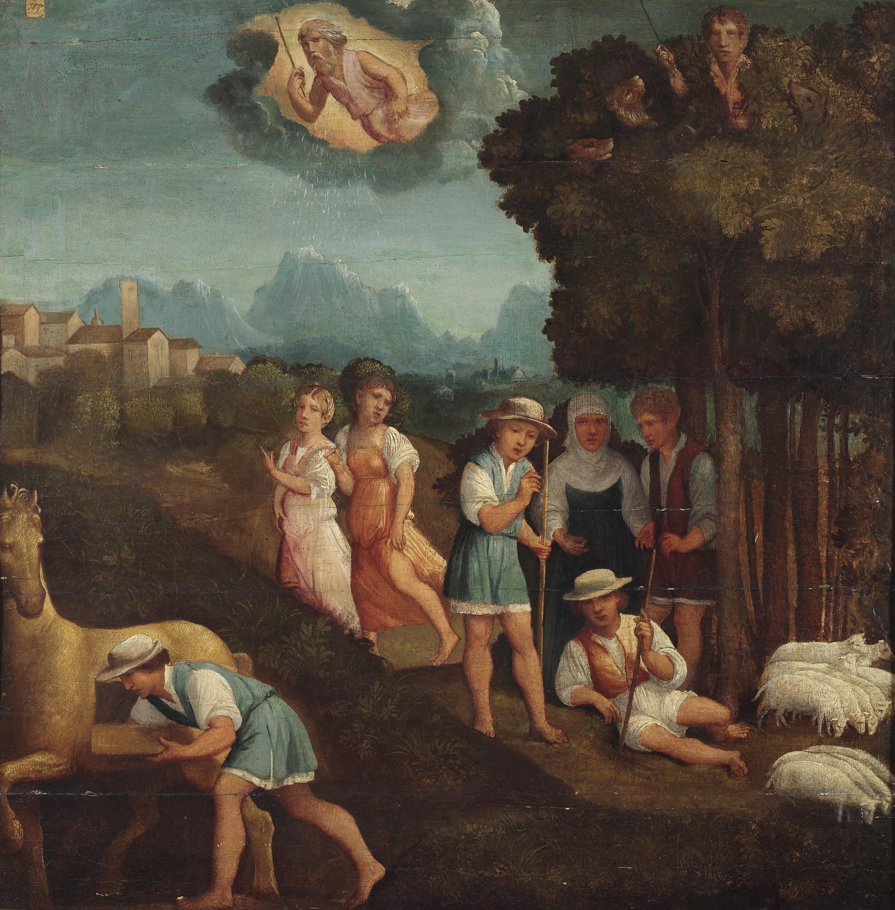 Der Ring des Gyges Öl auf Holz, 89 x 89 cm, ferraresische Schule des 16. Jahrhunderts (Emilio Negro schlägt eine Zuschreibung an Francesco Rizzi da Santacroce vor, fl. Veneto/Lombardei 1. Hälfte 16. Jahrhundert).